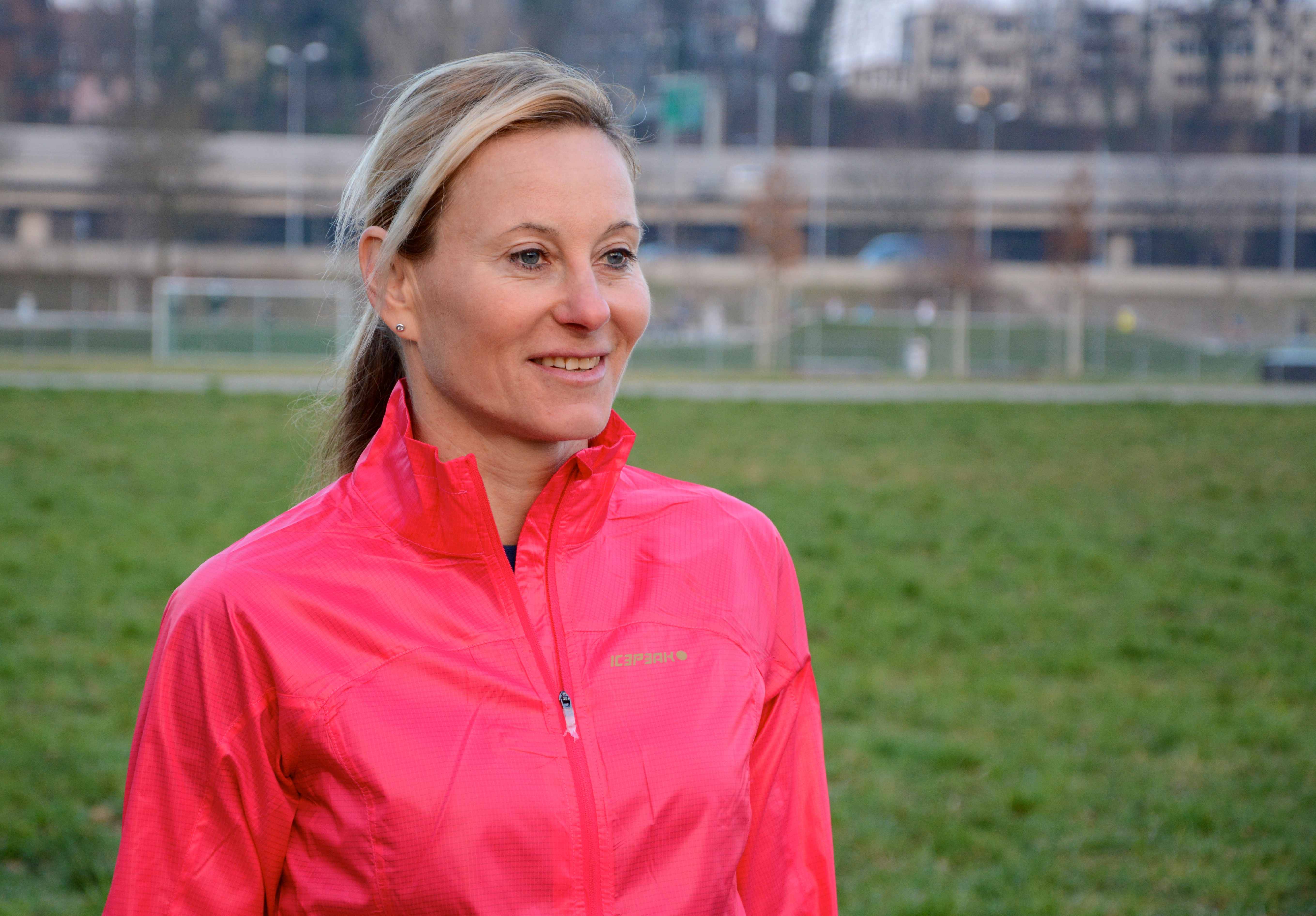 Brigitte McMahon en 2015 au marathon de Zurich